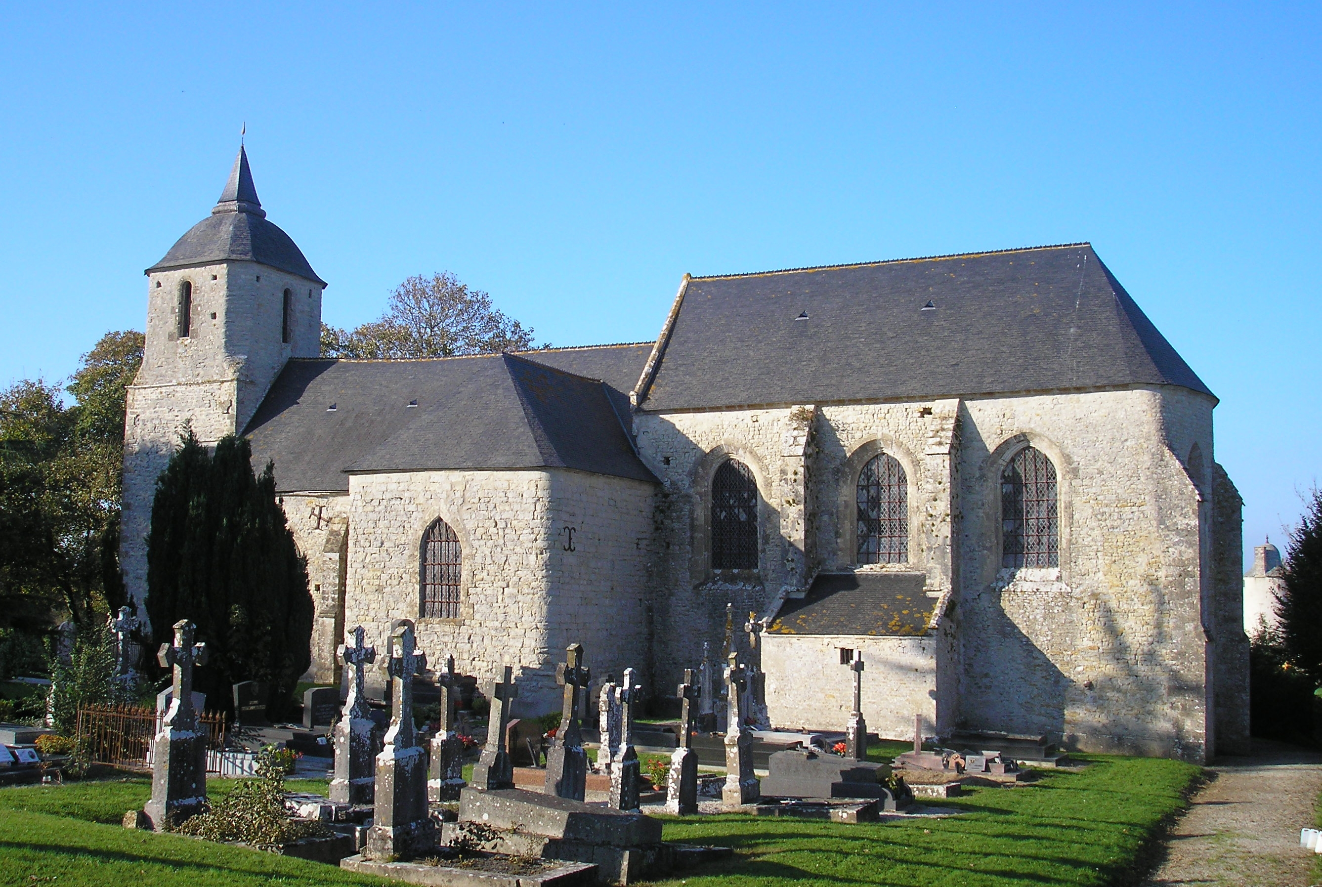 Sébeville (Normandie, France). L'église Saint-Pierre-Saint-Paul.